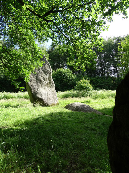 Louergad. Pergad 2